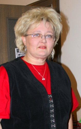 Tatjana Jambrišak na SFeraKonu u Zagrebu